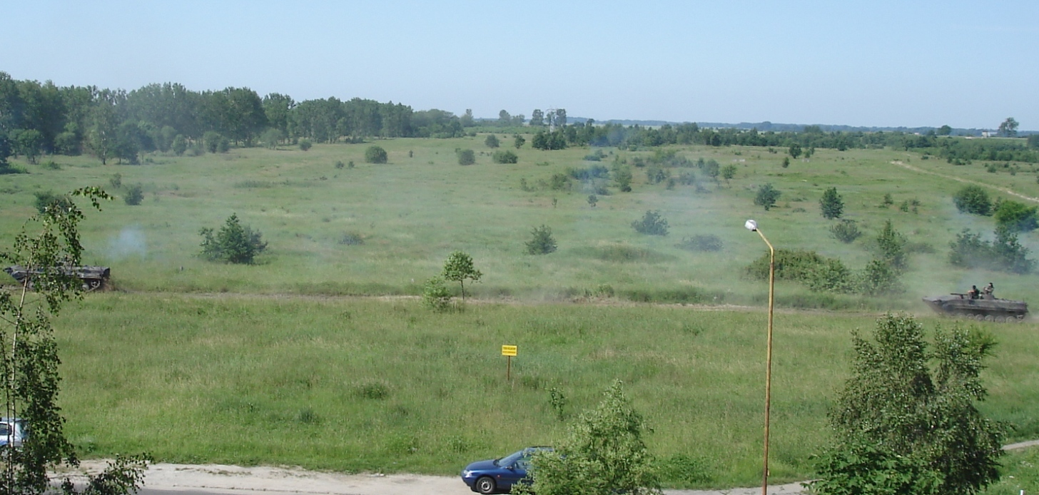 Kompania na BWP z z 2bzmot